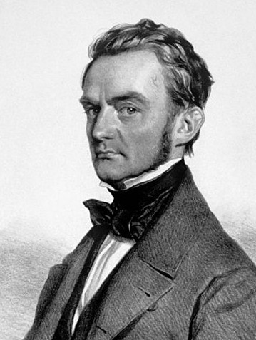 Theodor Vernaleken